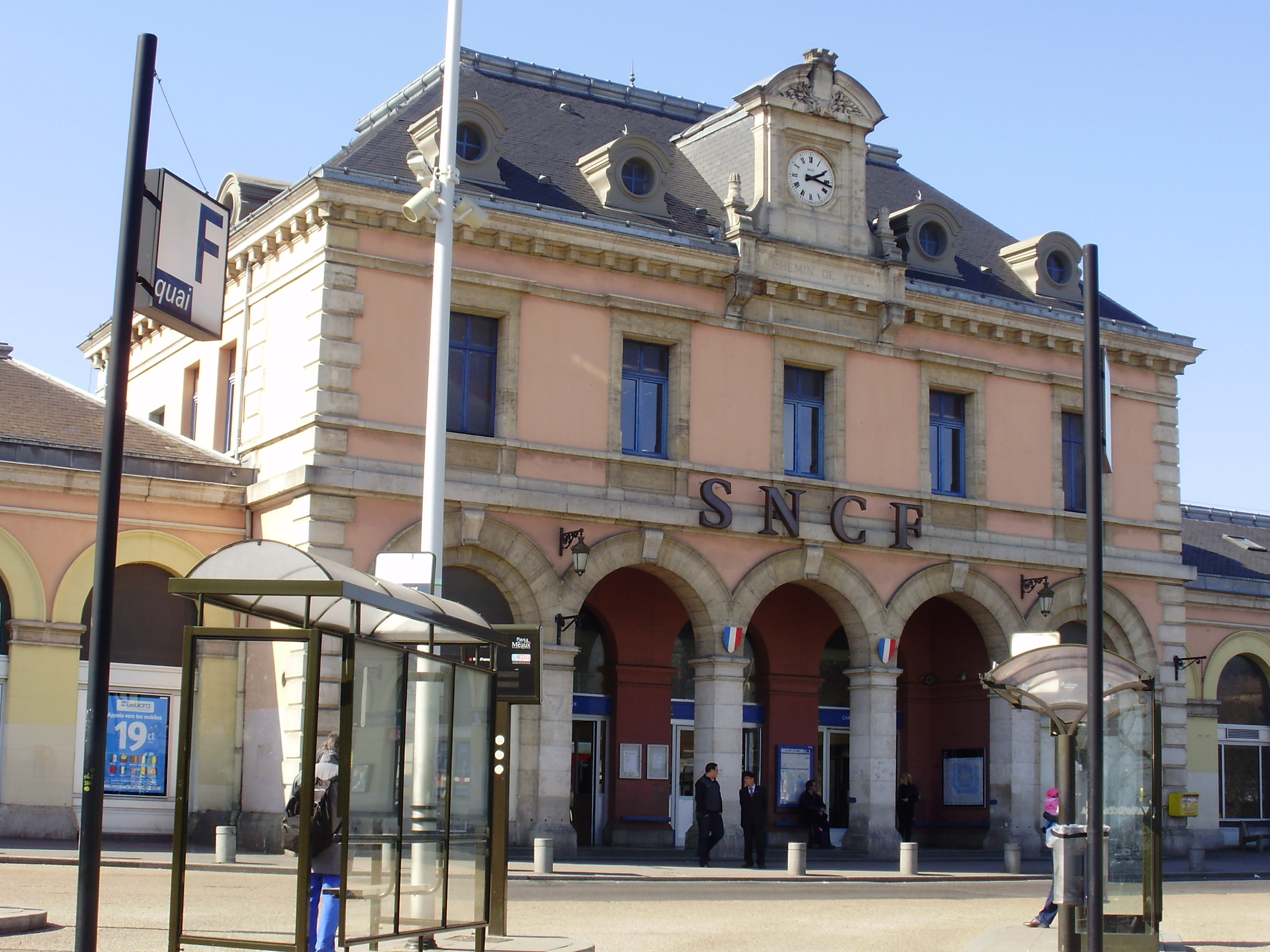 Gare de Meaux, Seine-et-Marne, France (Entrée du bâtiment voyageurs)